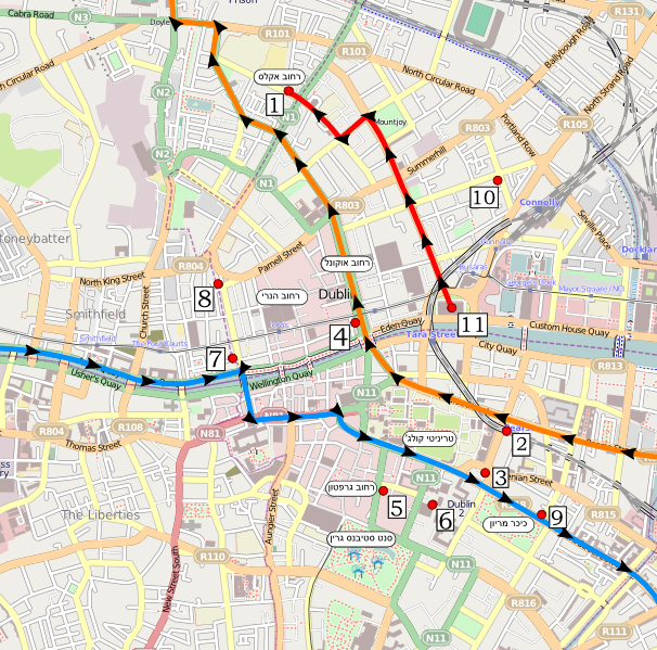 מפת דבלין